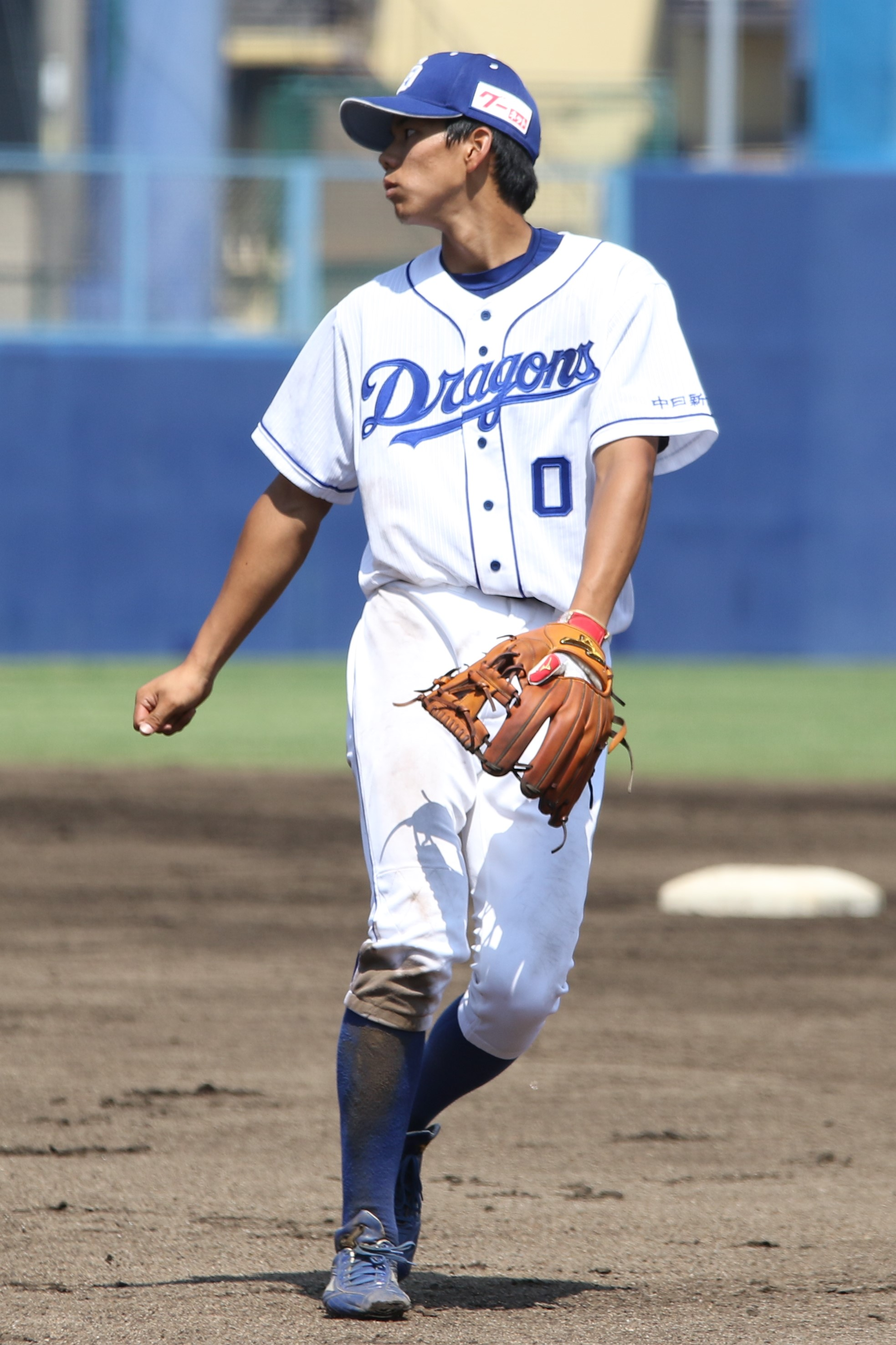 2019年6月22日、ナゴヤ球場にて